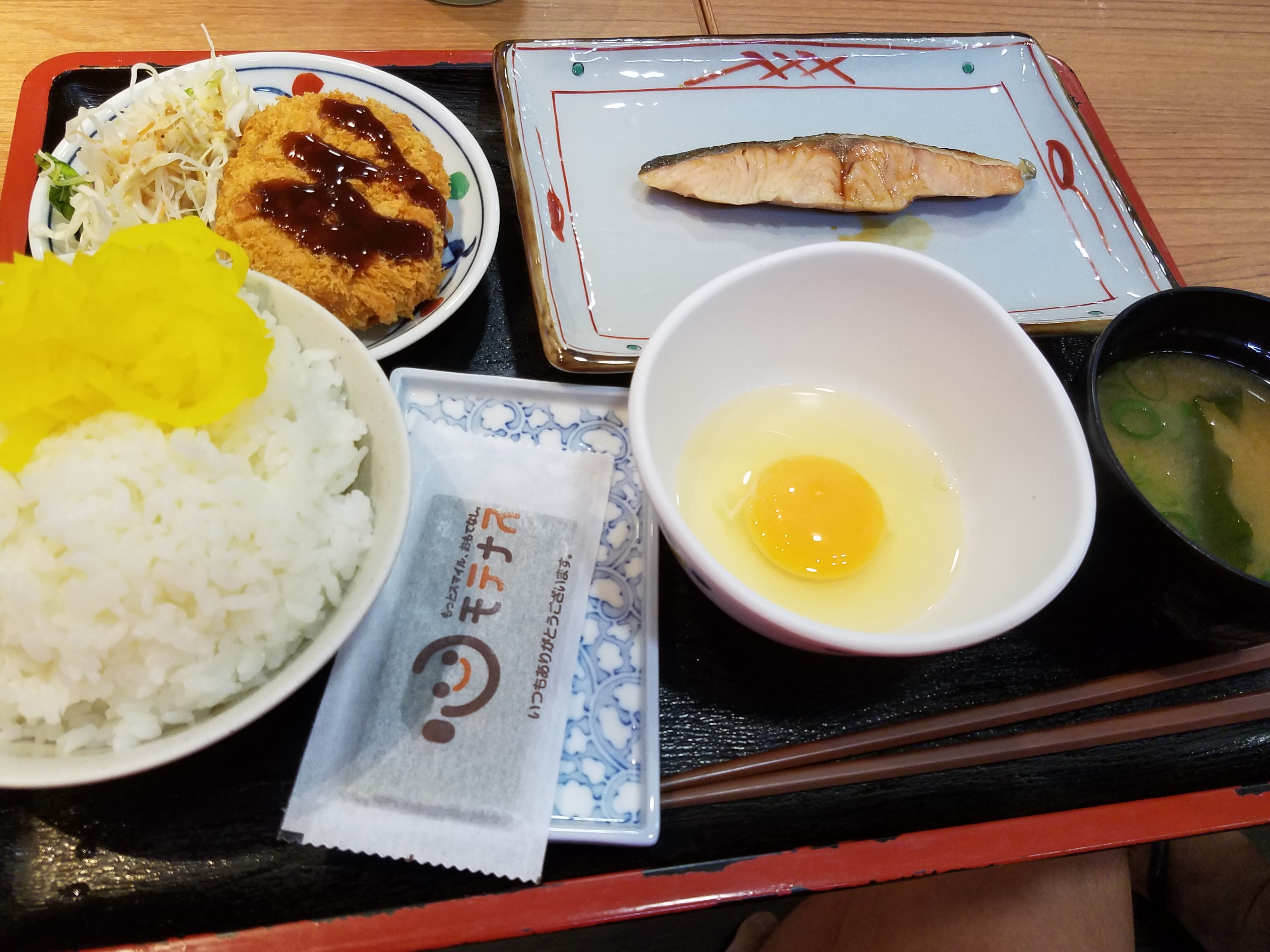 福岡県朝倉市杷木（九州北部豪雨）・熊本県益城町（熊本地震）で災害ボランティア（援人 2017年 0818-26便）